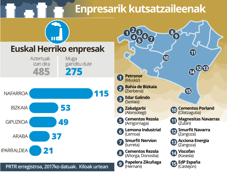 Grafiko interaktiboa